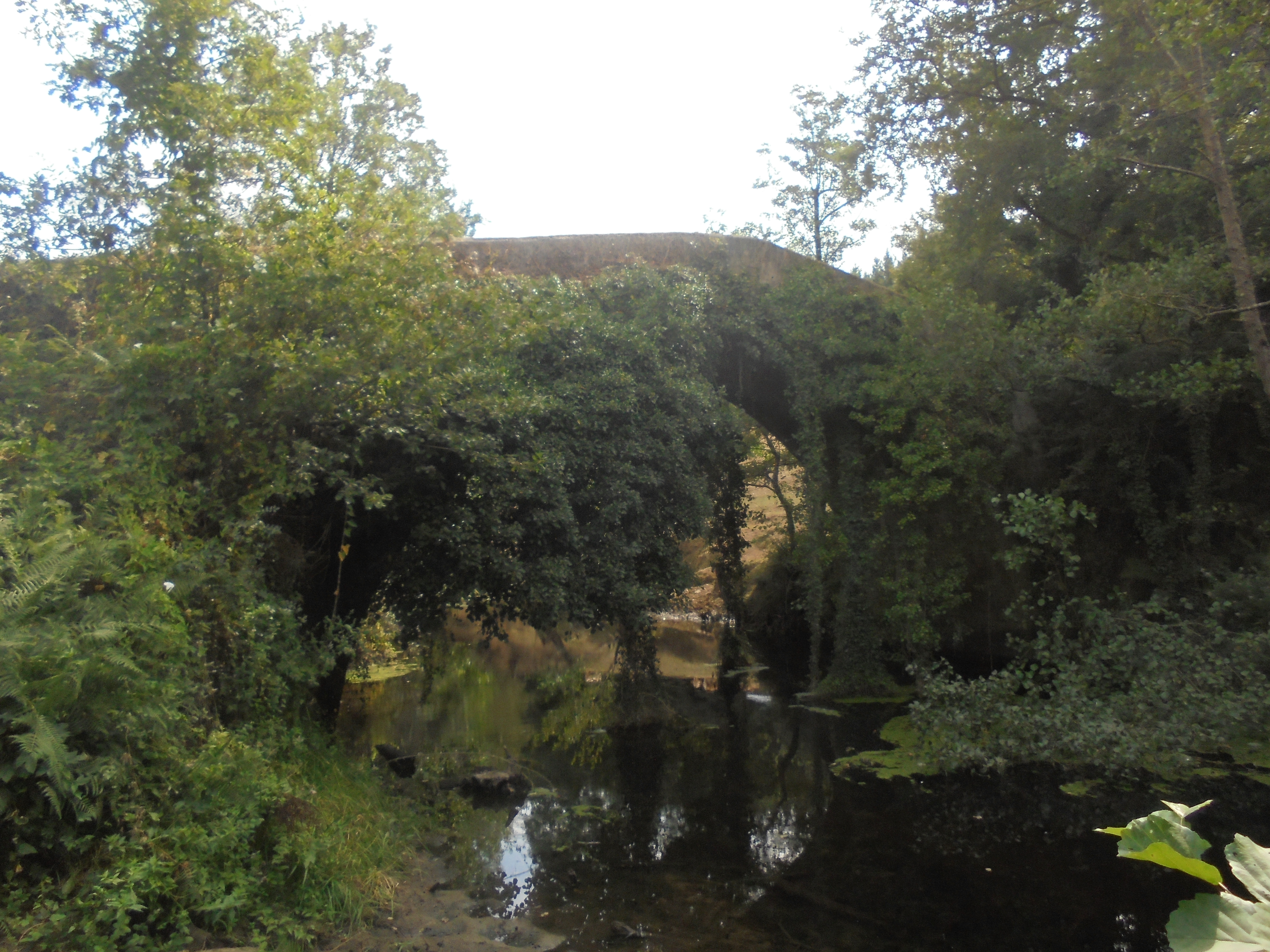 Ponte medieval de Lago ( Abragán)